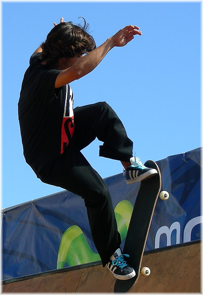 Skate in A Coruña, Galicia (Spain).